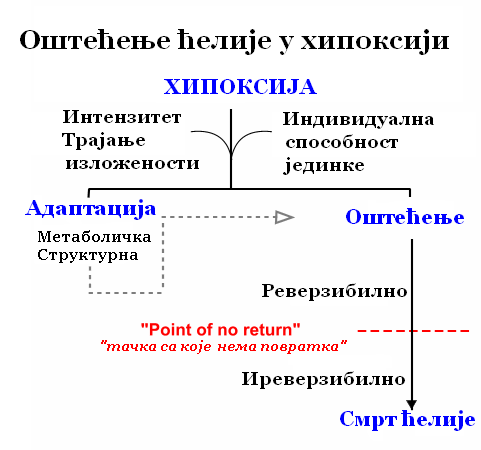 Mehanizmi oštećenja ćelije u hipoksiji